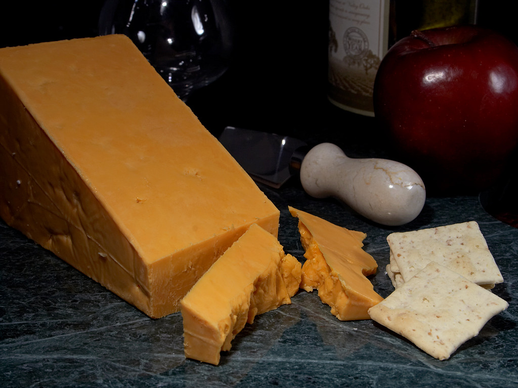 Red Leicester cheese